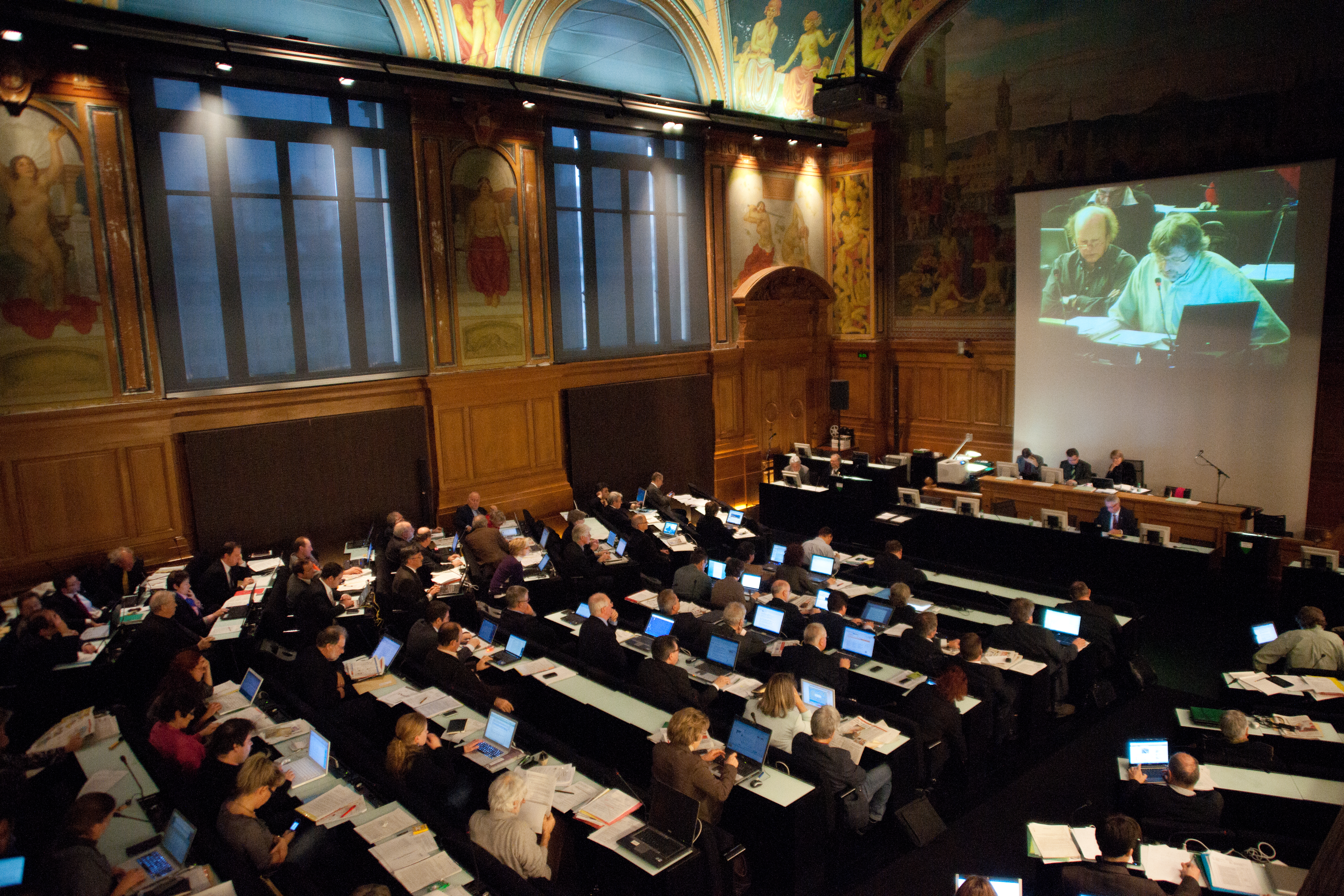 Séance du Grand Conseil de l'État de Vaud.